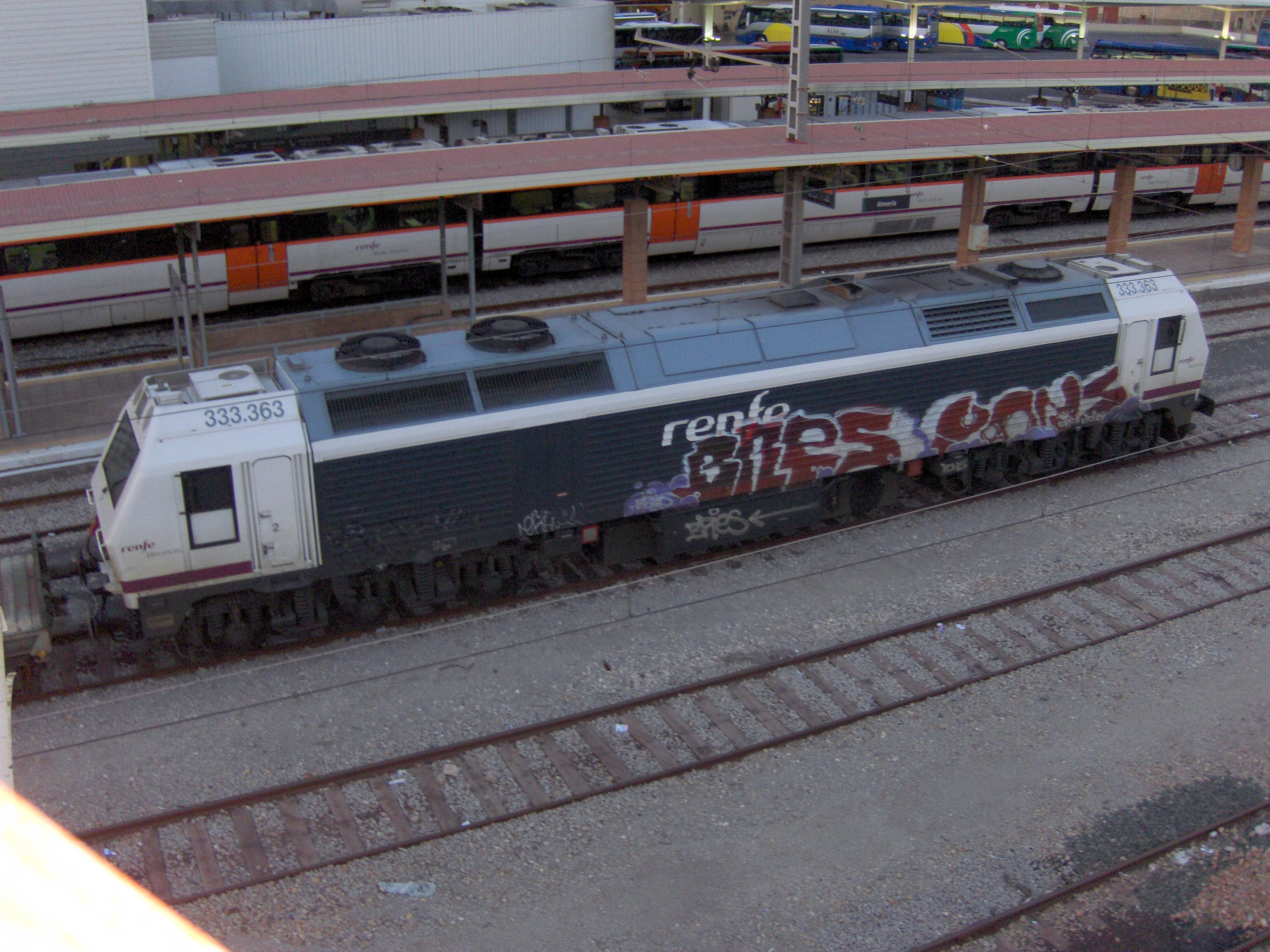 Locomotora de Renfe, unidad 333.363, en Almería